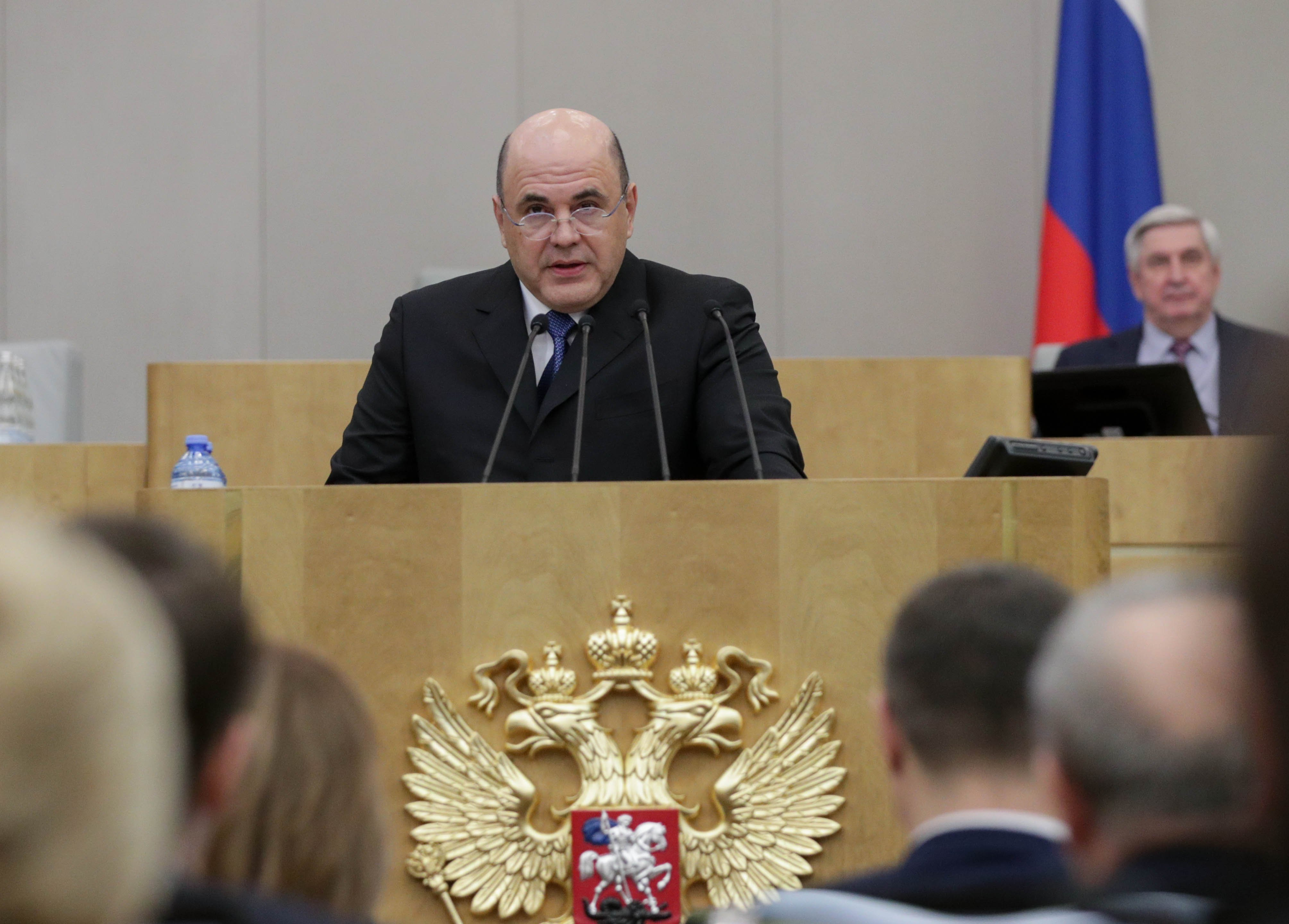 Слушания по даче согласия президенту России на назначения М.Мишустина на пост председателя правительства